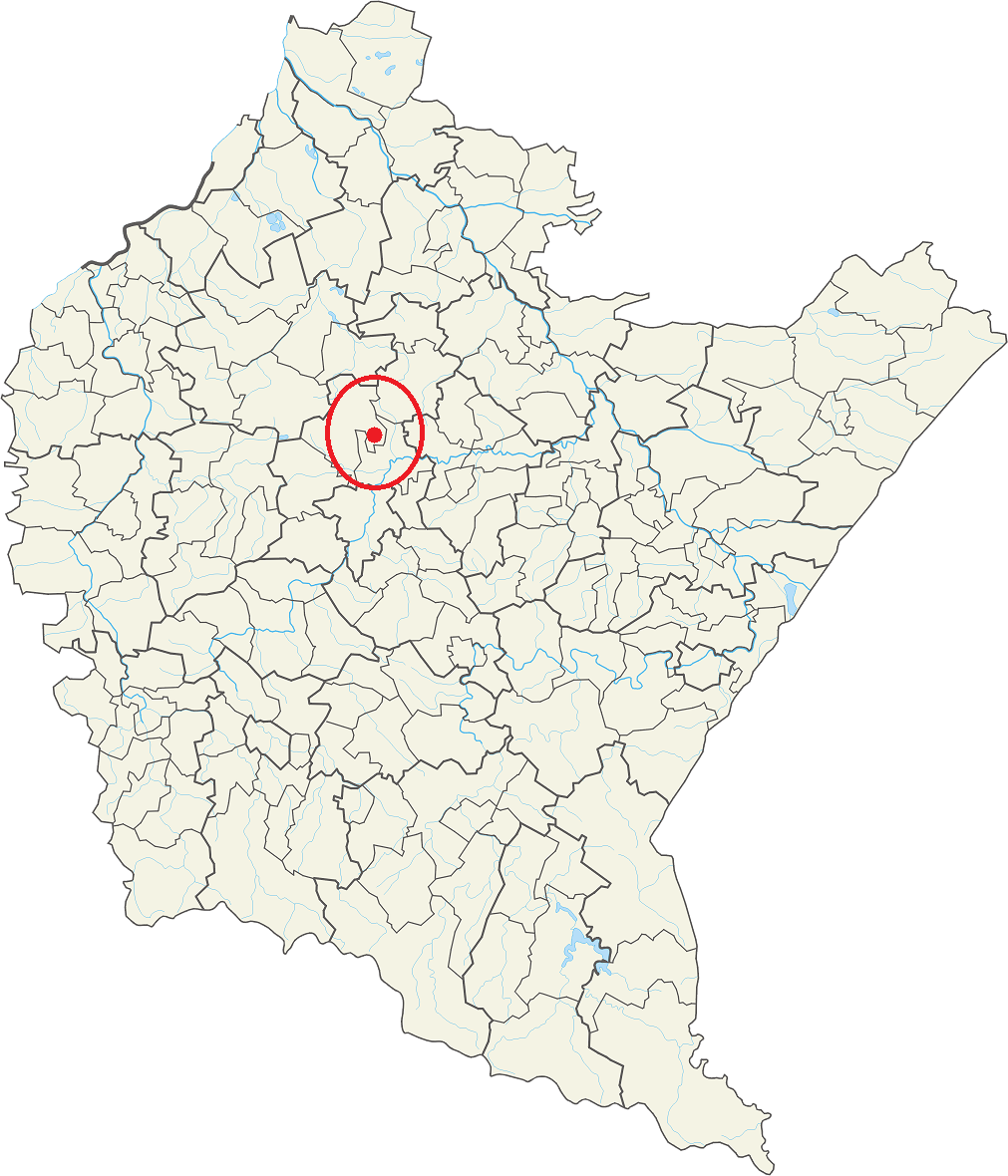 Localización de Wysoka Głogowska dentro del Voivodato de Subcarpacia